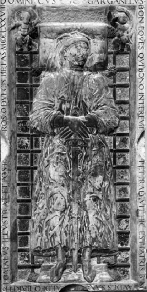 Lastra tombale di Domenico Garganelli, opera di Francesco del Cossa. Museo medievale di Bologna.